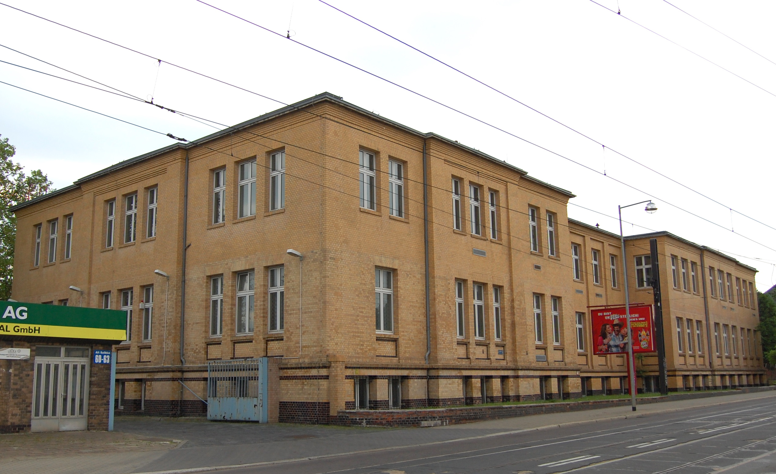 Gebäude südlich des Haupteingangs von Fahlberg-List